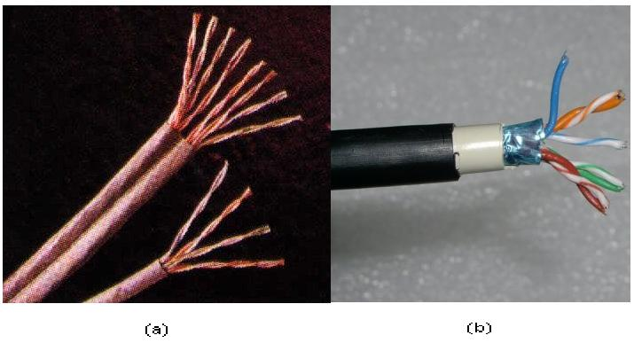 cable_utp1